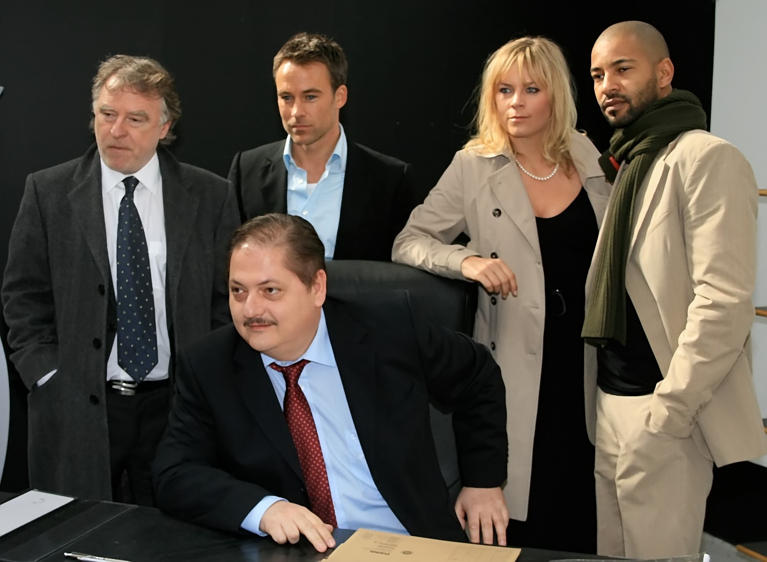 Darsteller aus SOKO Leipzig. Hinten von links: Andreas Schmidt-Schaller, Marco Girnth, Melanie Marschke, Tyron Ricketts, vorne Jürgen Tarrach